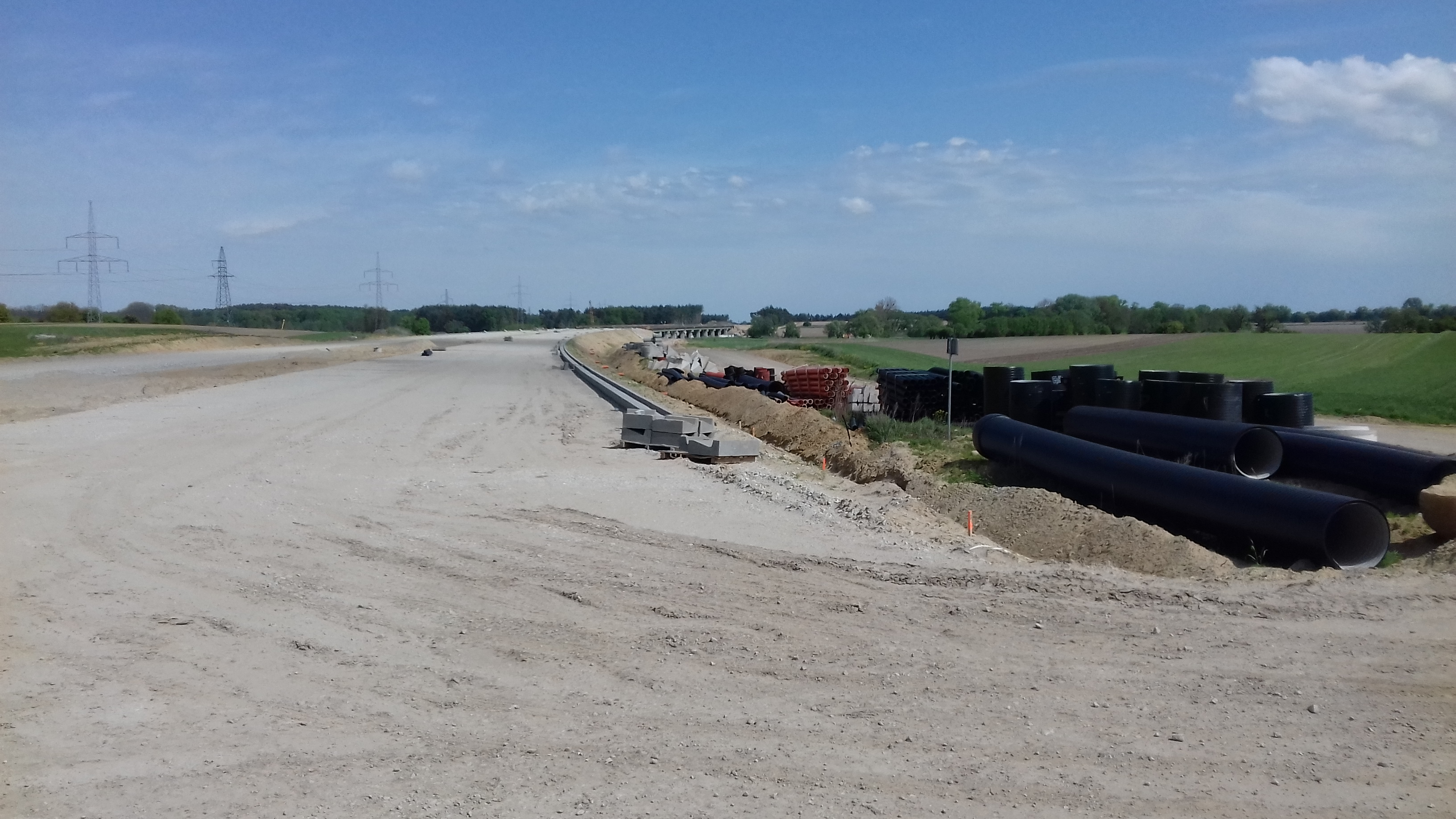 Budowa drogi ekspresowej S5 na odcinku Poznań-Zachód - Wronczyn, most nad doliną Samicy Stęszewskiej w budowie (stan na maj 2018 r.)